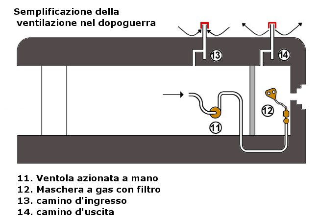 schema condiz d'aria in un bunker